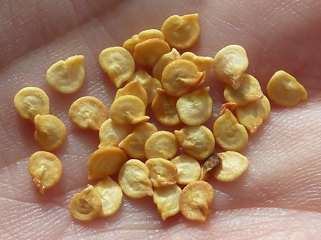 Capsicum annuum cv. Lamuyo (Pimiento Lamuyo): Simientes sueltas.